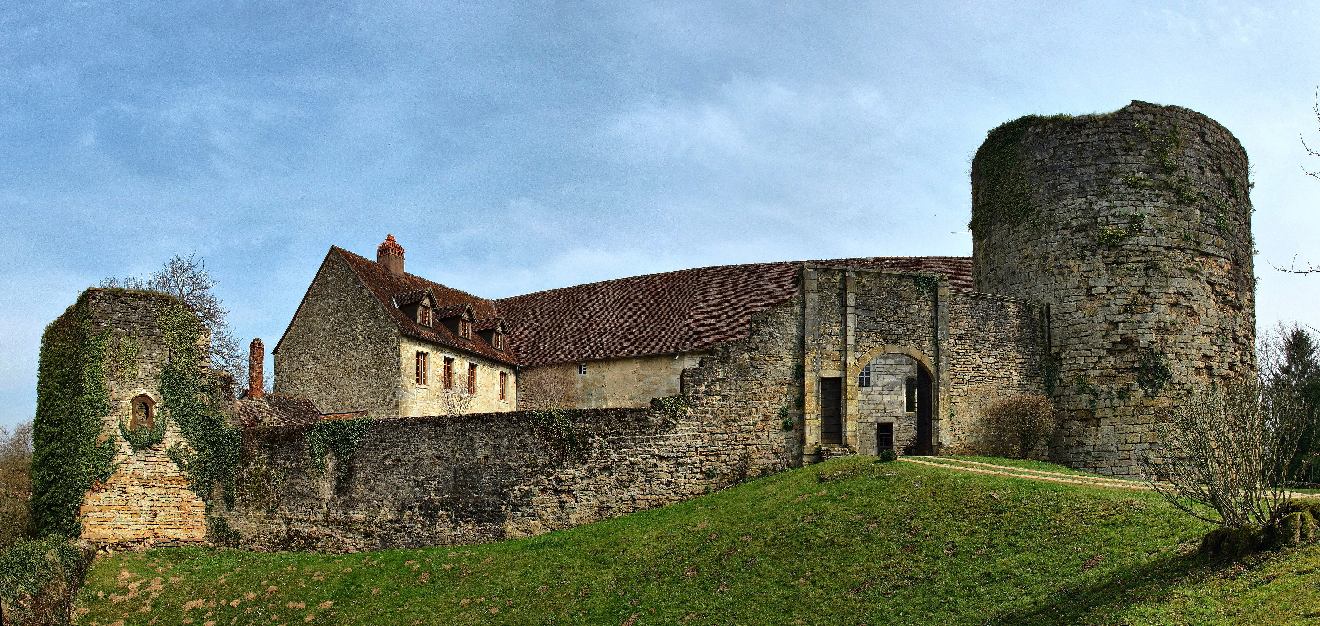 Inscrit aux monuments historiques sous le numéro PA00101642